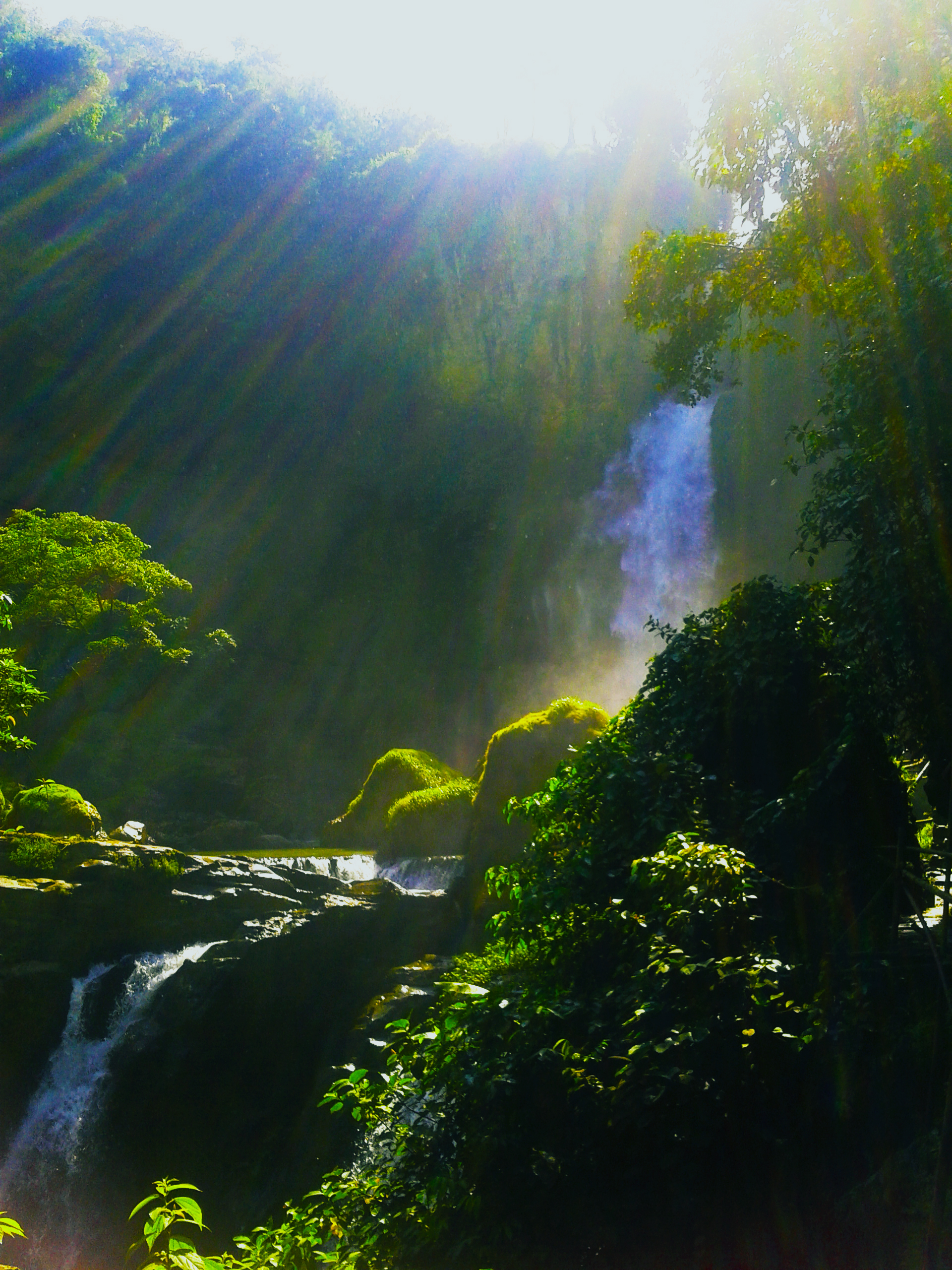 Adalah salah satu air terjun / curug destinasi wisata yang ada di kawasan Geopark Ciletuh Palabuhanratu. Letaknya sekitar 5 KM dari pantai palangpang.